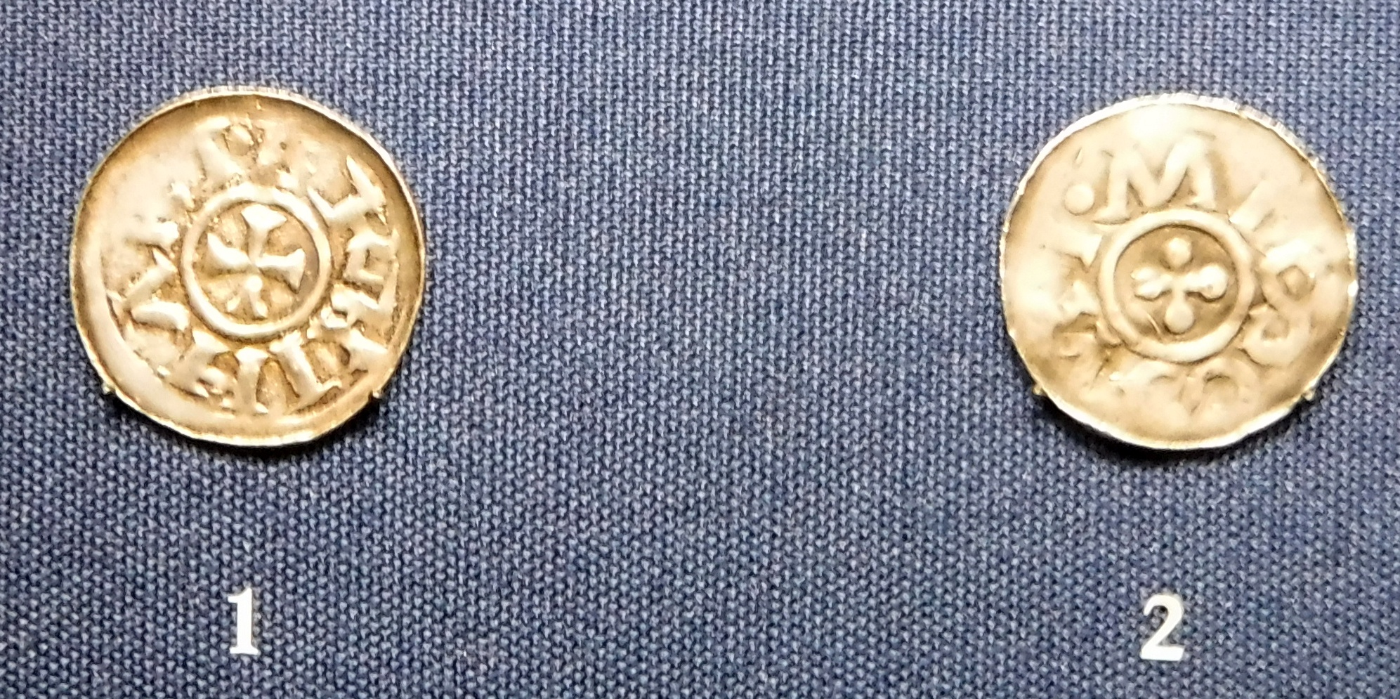 Die ältesten Münzen der Markgrafen von Meißen 1 - 2: Denare, unter Ekkehard I. (985 - 1002) geprägt Erste Münzprägung in Meißen; zu sehen je ein Kreuz als Münzbild und den Worten EKKIHART und MISNI in den Umschriften